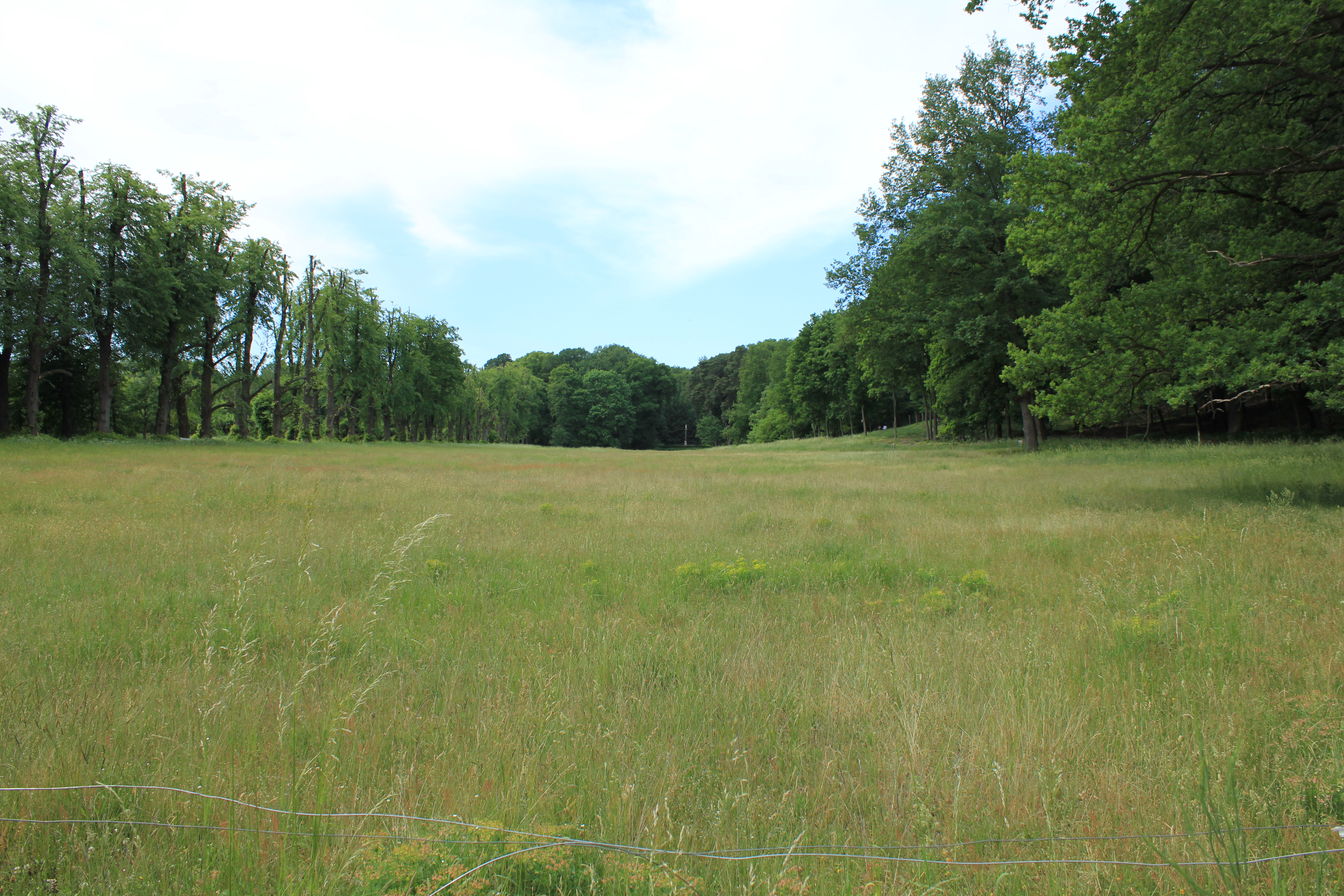 Schloßpark Tegel nach 1766 bis Anfang 19. Jh., ab 1802 von Karl Friedrich Schinkel